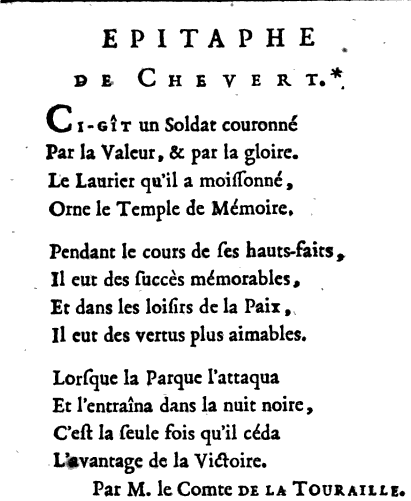 Epitaph de chevert écrit par le Comte de la Touraille